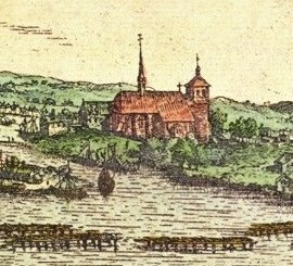 Church Riddarholmskyrkan viewed from north. Stockholm, Sweden. Detail from an engraving by Frans Hogenberg, c. 1570.